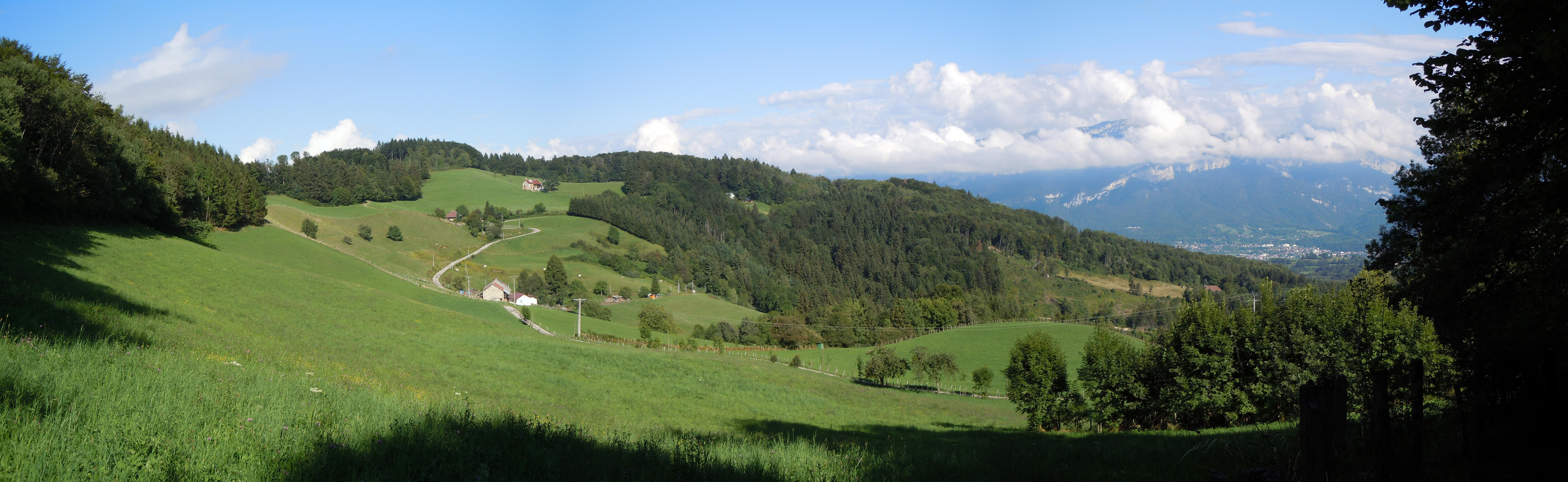 Depuis le col du Pilori ( 880 m) - Saint-Aupré - Isère - France - Vue sur les fermes de la Montagne